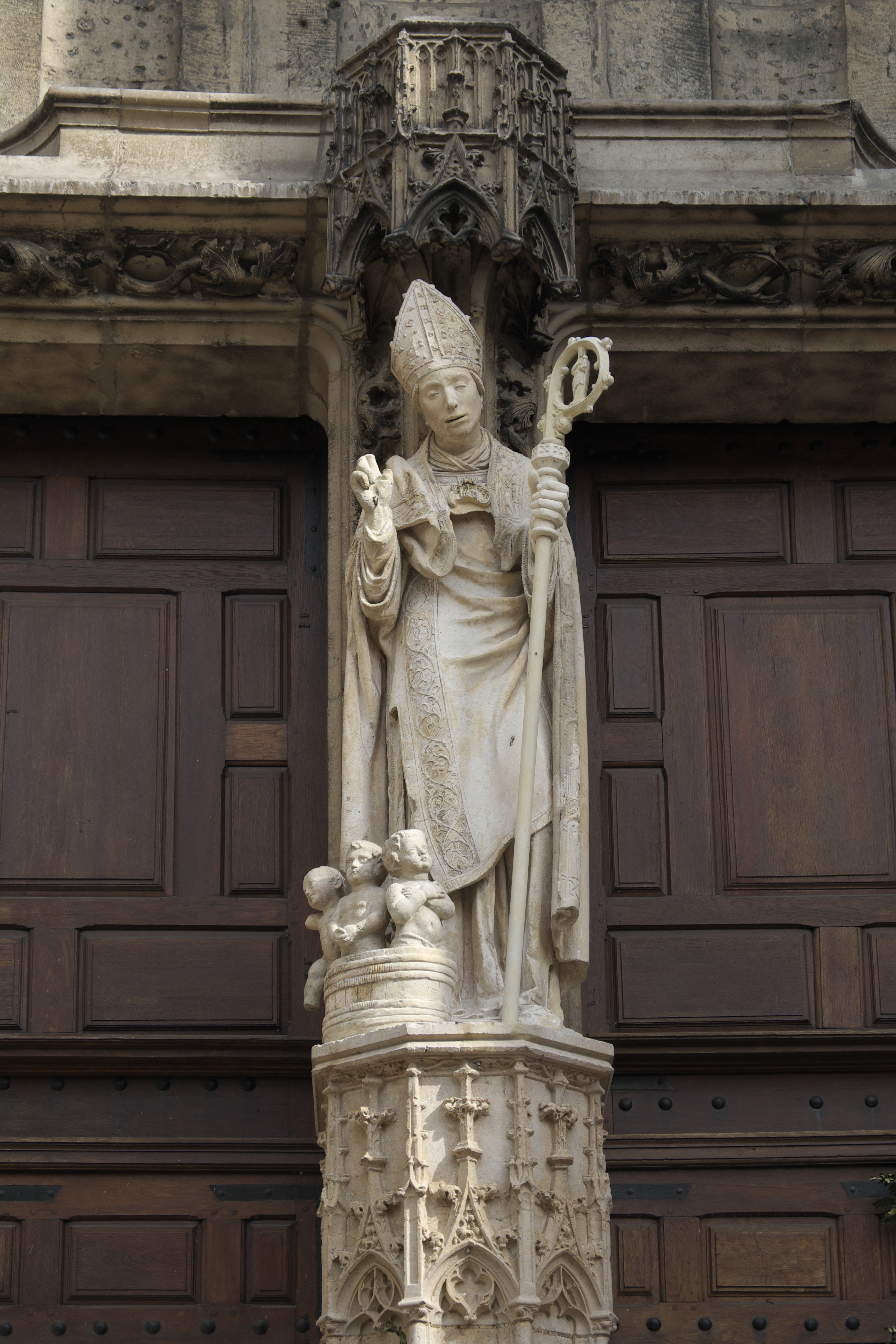 Basilika Saint-Nicolas in Saint-Nicolas-de-Port im Département Meurthe-et-Moselle (Lothringen/Frankreich), Westportal mit der Skulptur des hl. Nikolaus und den drei Scholaren im Salzfass